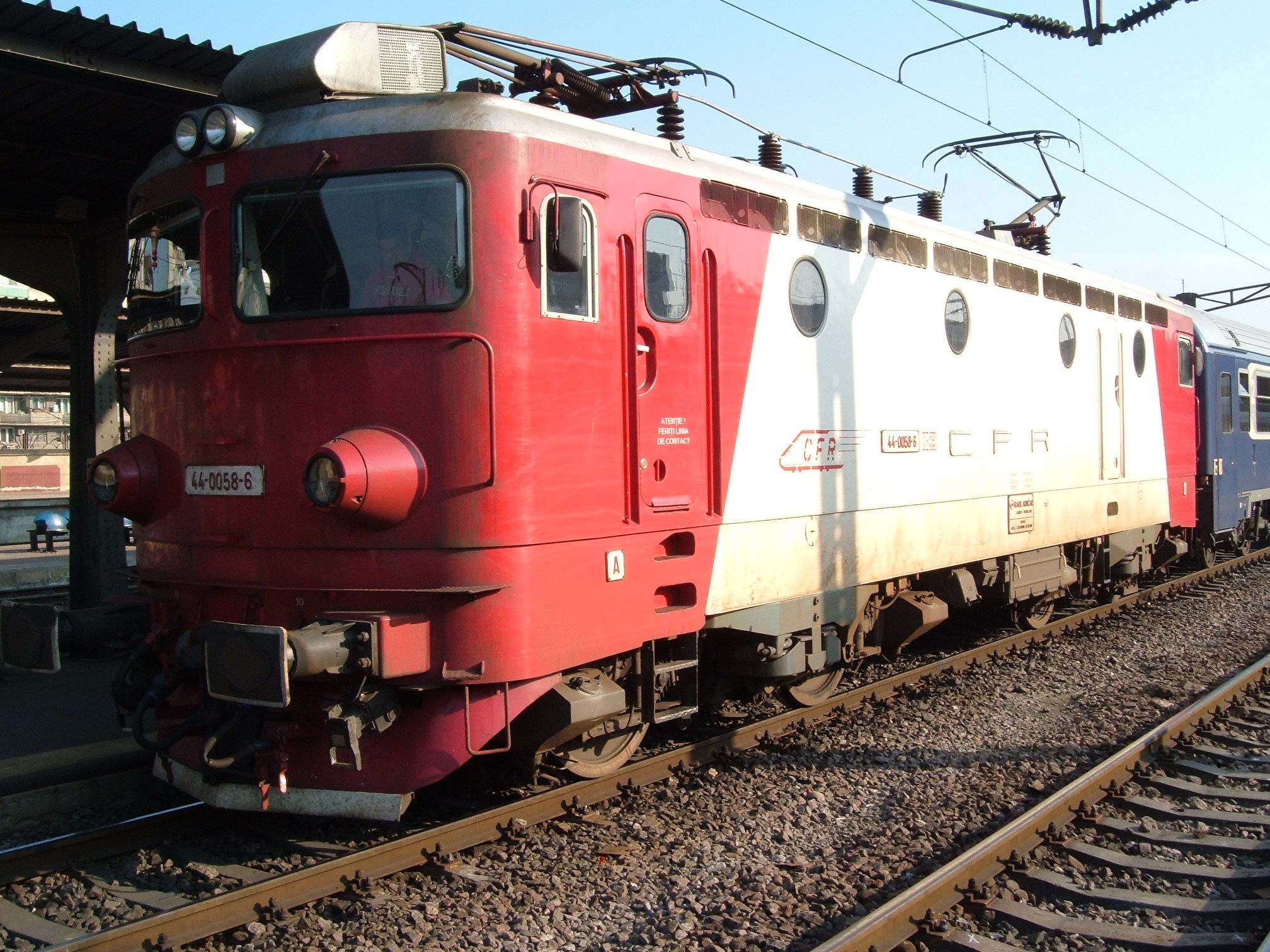 Locomotiva CFR clasa 44